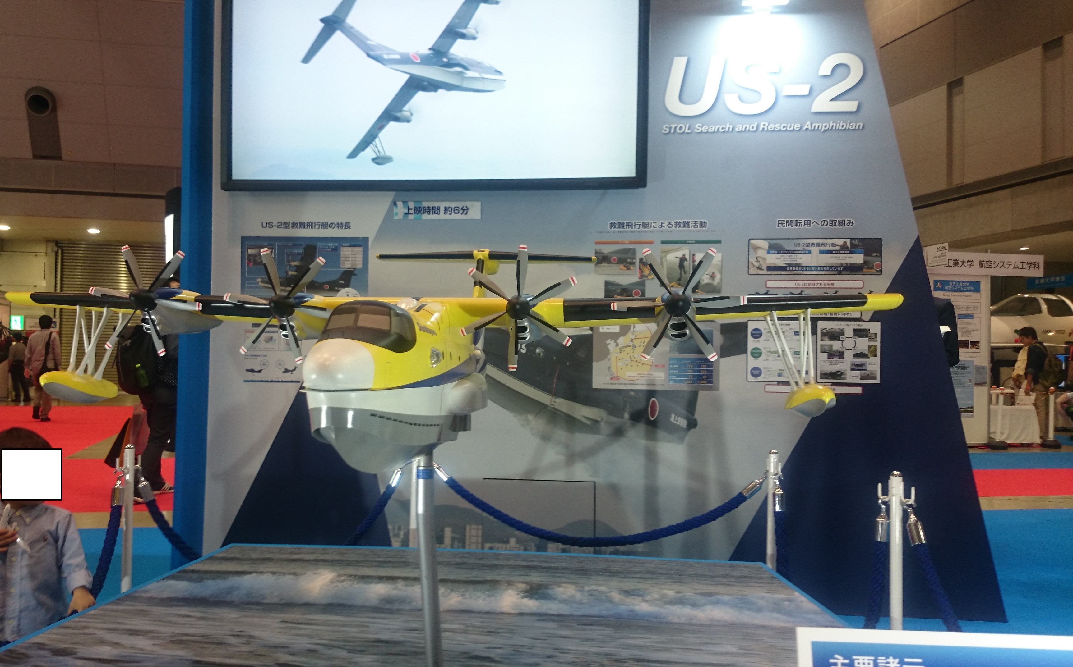 Variant